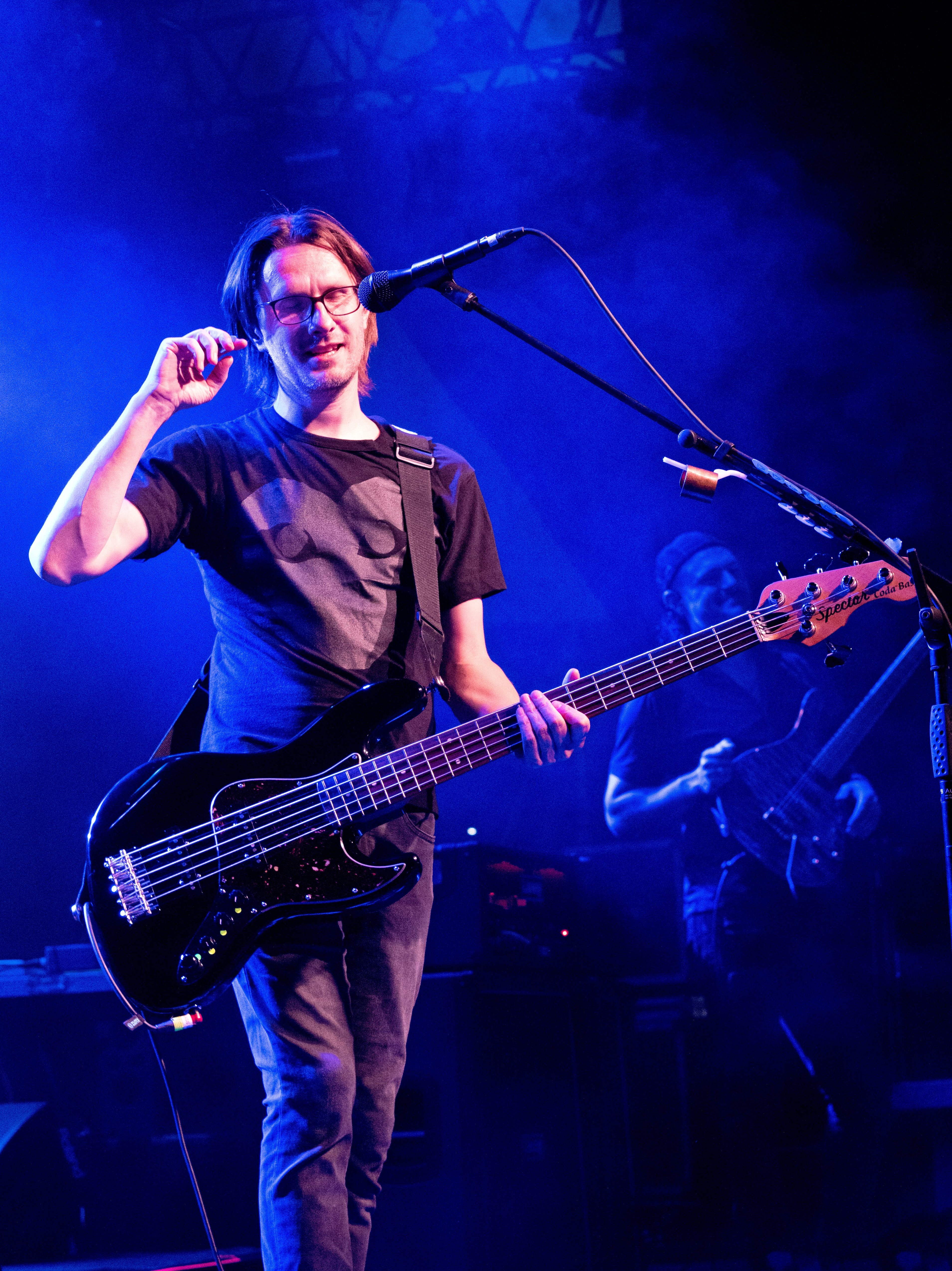 Bilder vom Zelt Musik Festival 2018 in Freiburg im Breisgau Das Eröffnungskonzert mit Steven Wilson